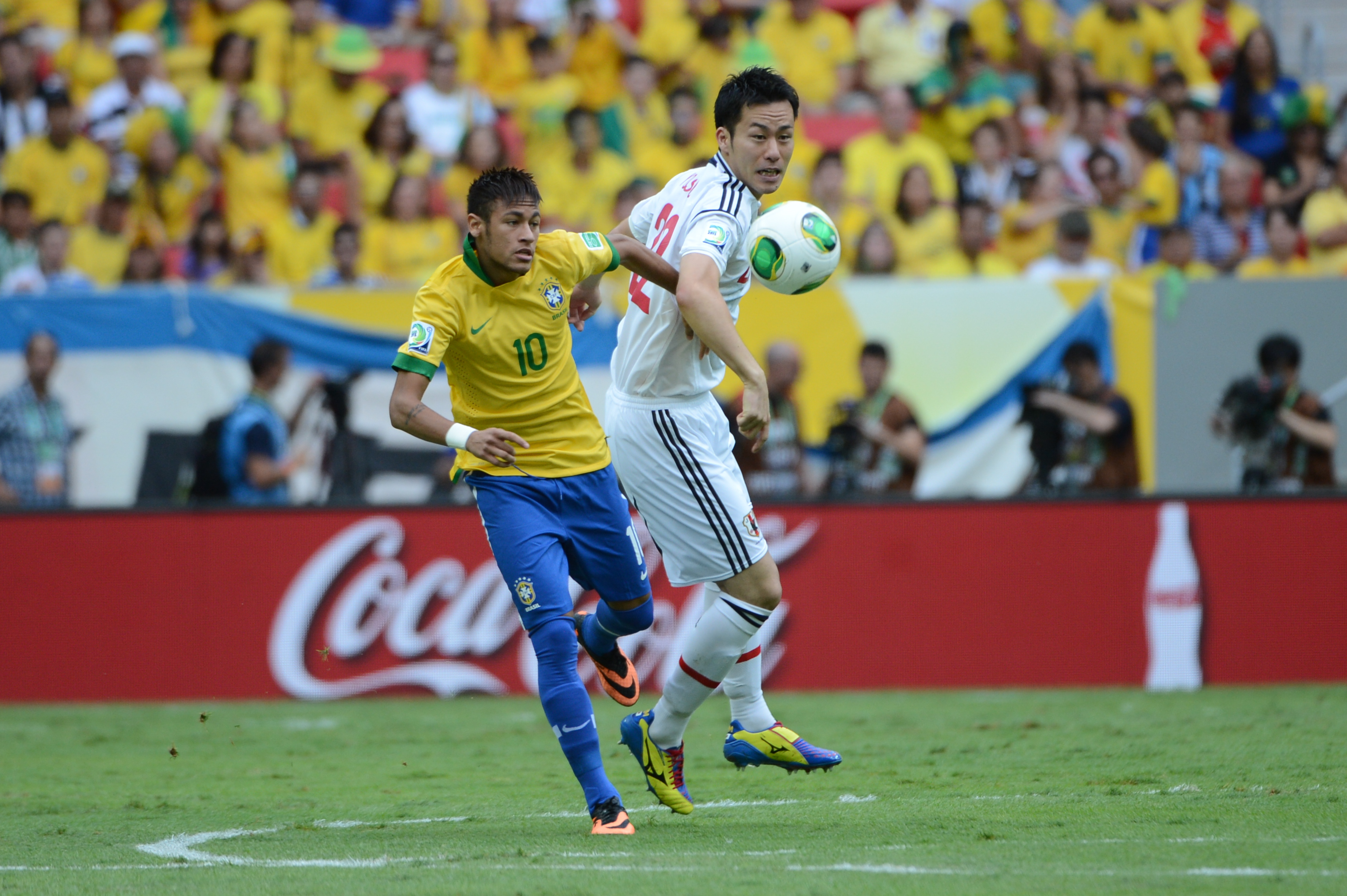 Jogo entre Brasil e Japão abre a Copa das Confederações